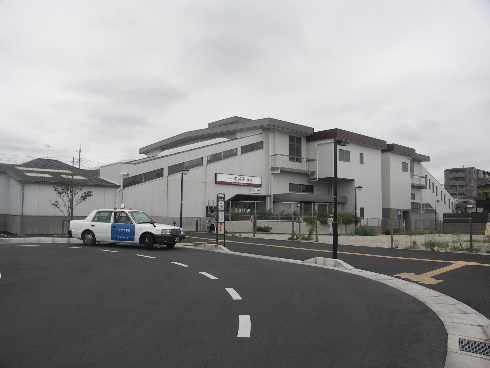 Sakasai station east rotary, Tobu-Noda Line, Chiba, Japan, 逆井駅東口駅前広場